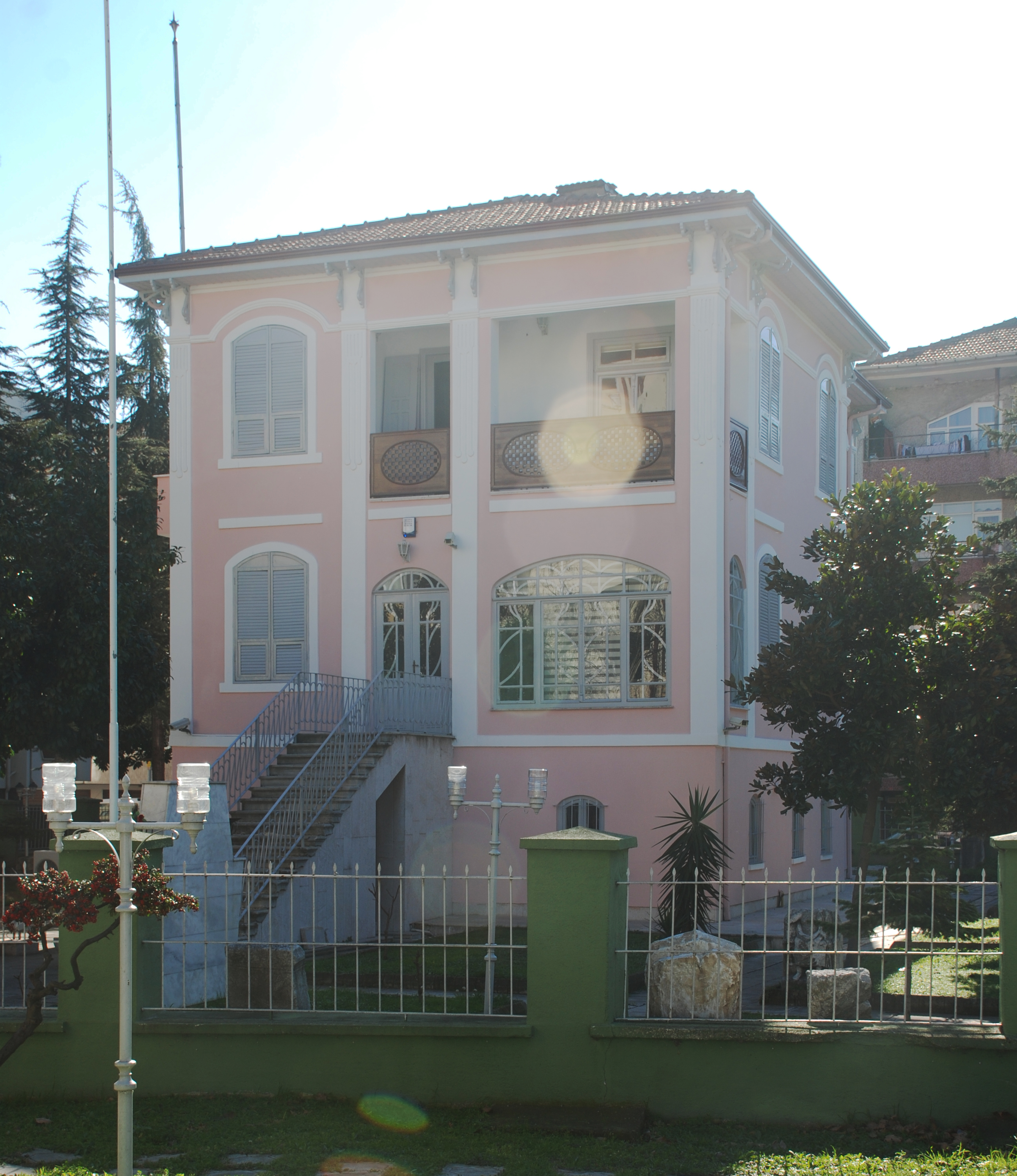 Atatürkün Adapazarına geldiğinde konakladığı ev: günümüzde Sakarya müzesi.